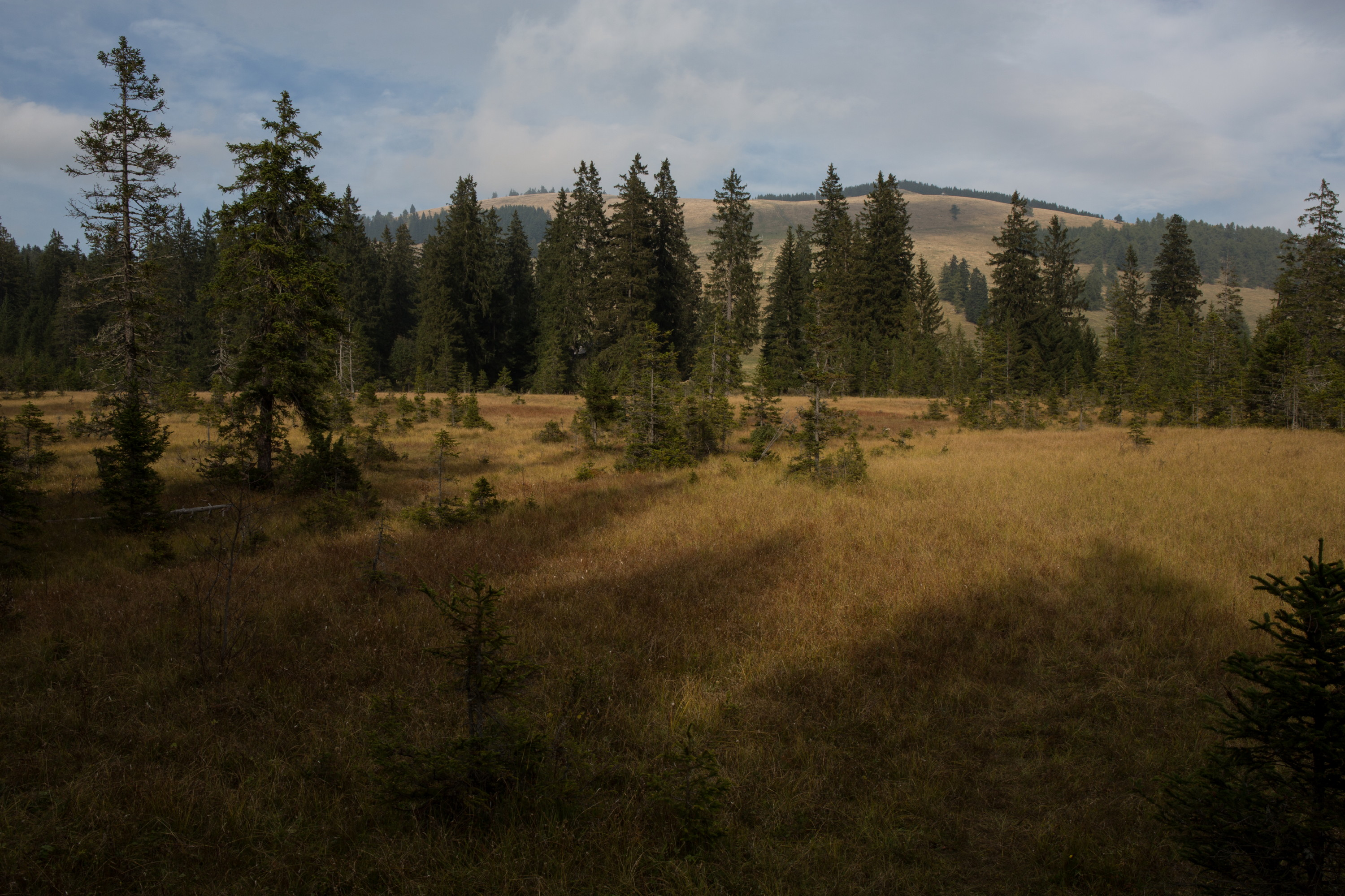 Latschen-Hochmoor (Fladnitz a. d. Teichalm) This media shows the nature reserve in Styria with the ID NSG 79 c.